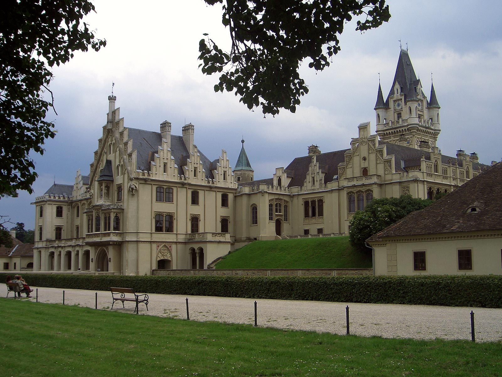 Schloss Grafenegg (Ansicht vom Nordwesten). Selbst fotografiert am 12.6.2005